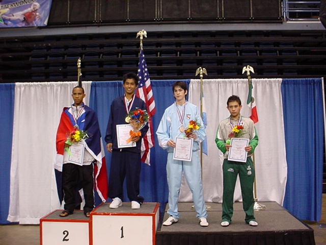 Premiacion Categoria Bantam. Cuatro competidores Junior